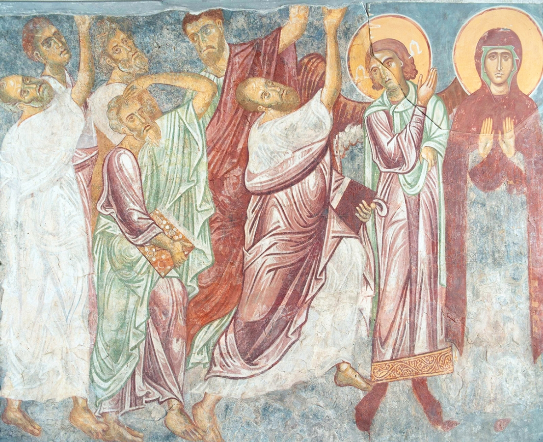 Фрески от "Свети Никола" в Мелник 12 - 13 век